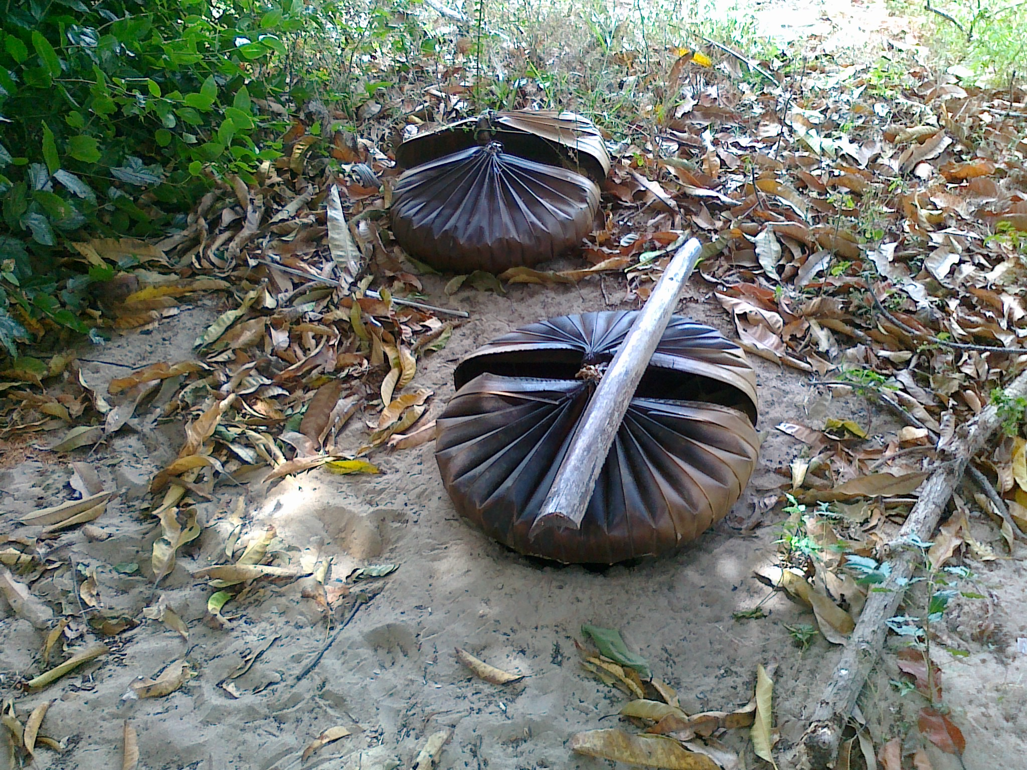 ஒலைப்பட்டை